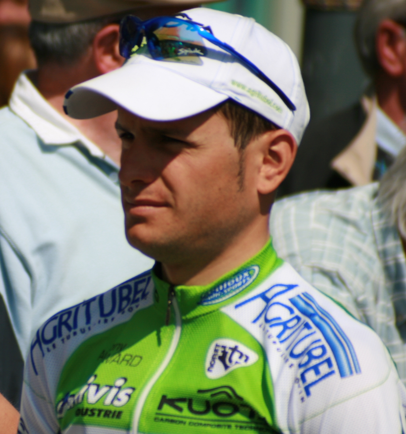 Anthony Ravard aux Quatre jours de Dunkerque 2008